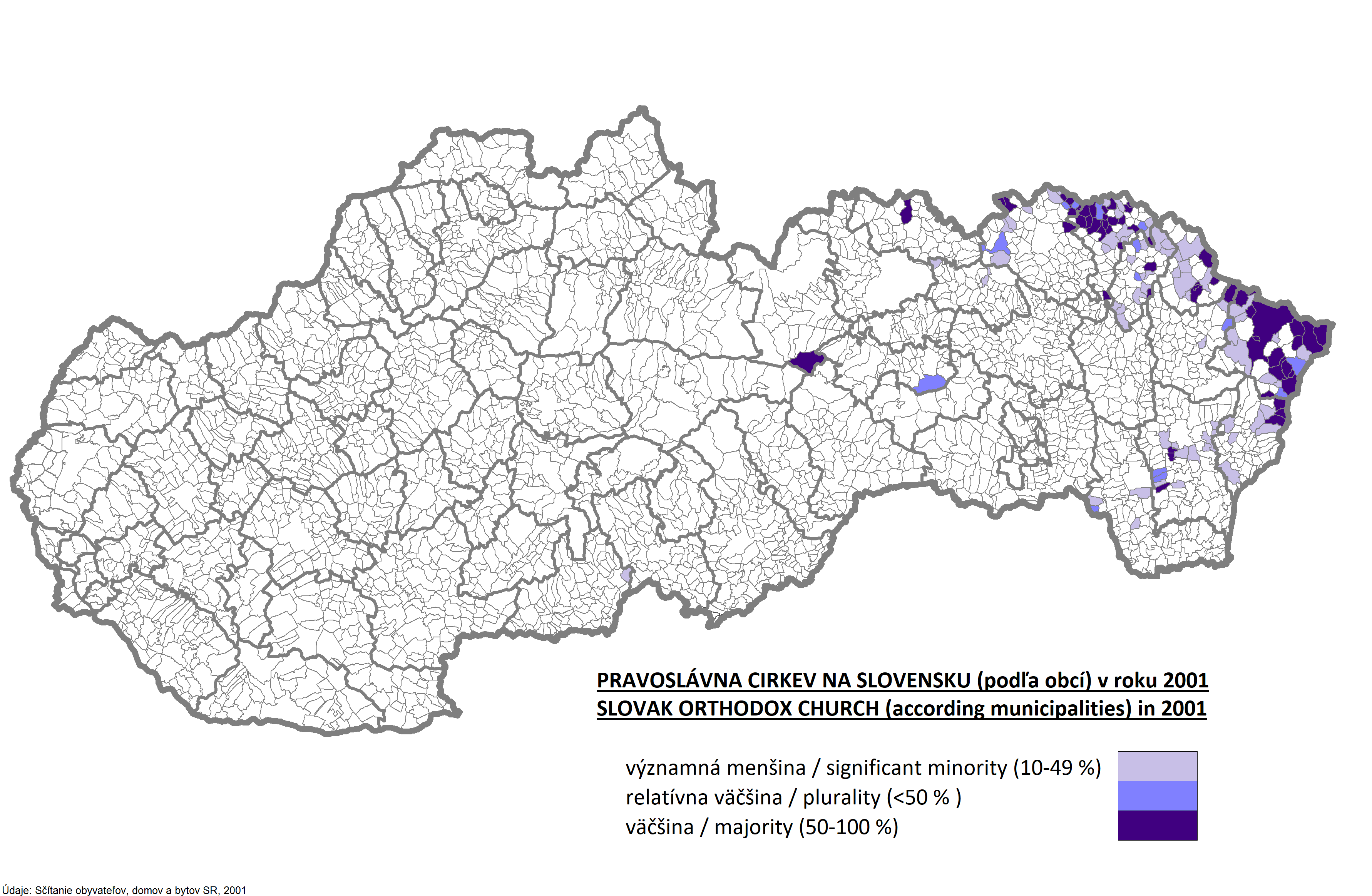 Pravoslávna cirkev SR 2001